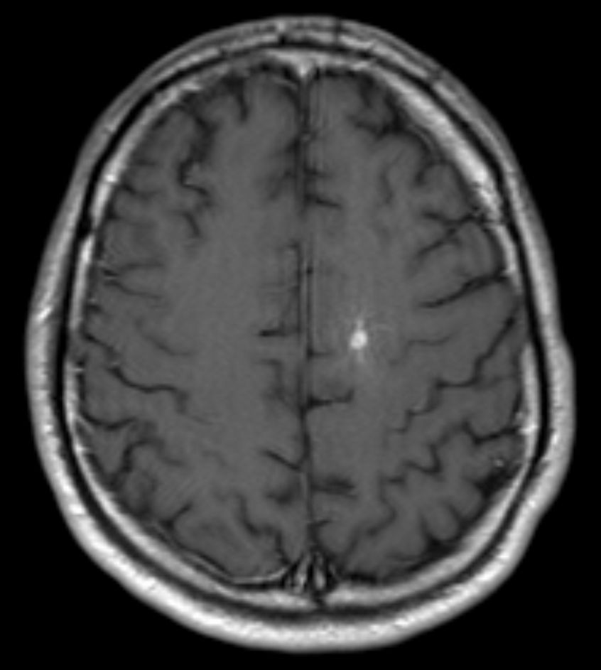 Developmental Venous Anomaly in der Magnetresonanztomographie T1KM axial.